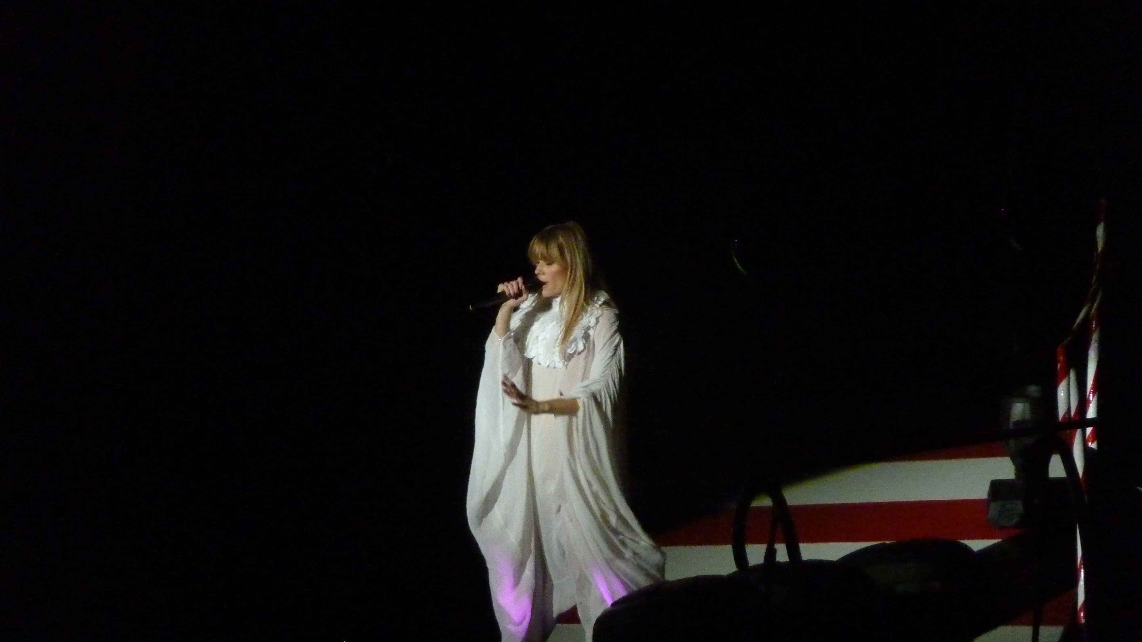 Oh Land